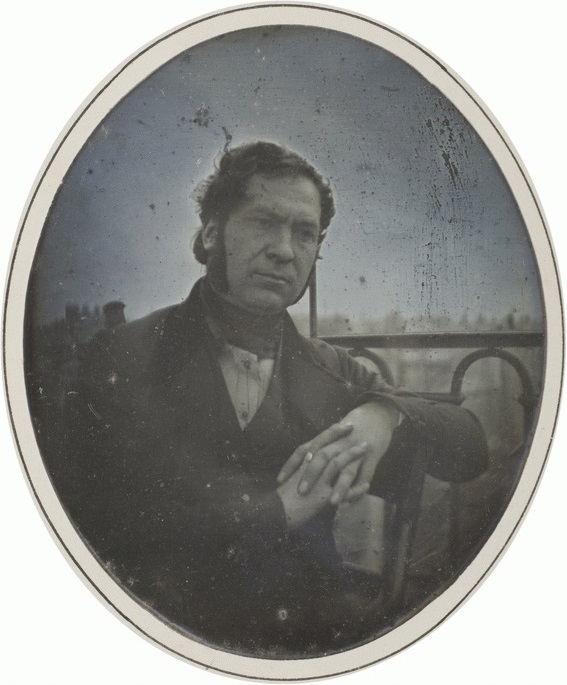 Portrait de Pierre Philibert Pompée réalisé sur la terrasse de l'Athénée Royal, 2, rue de Valois, le 23 juin 1841, à 1 heure.